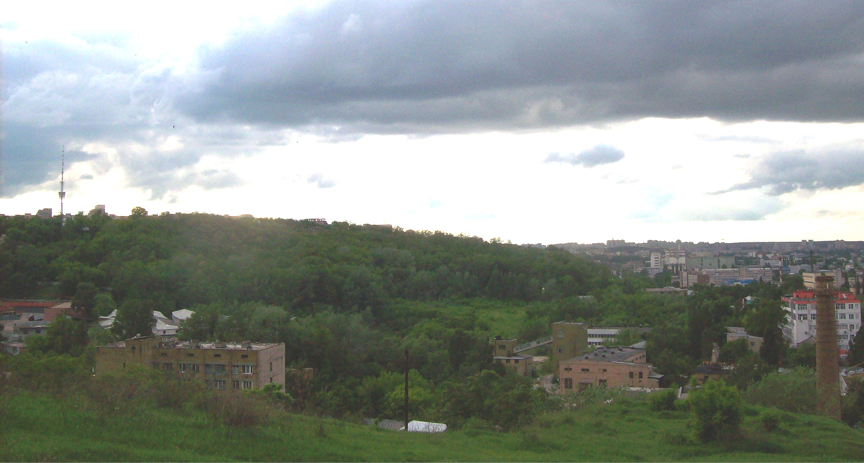 Юрковиця. вигляд східного та південного схилів зі Щекавиці